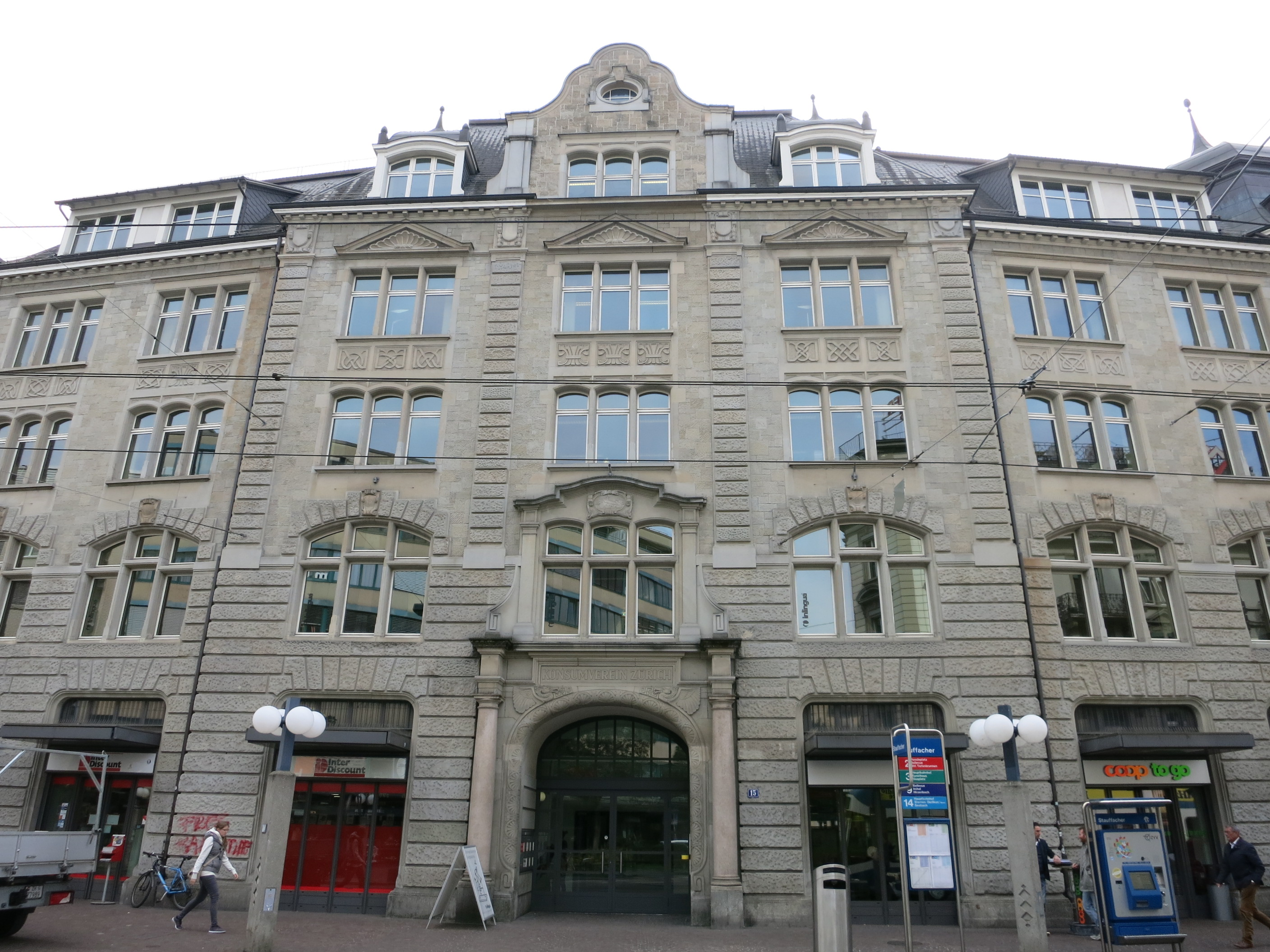 ehemaliges Verwaltungsgebäude des Konsumvereins Zürich von 1906, beim Stauffacher, Stadt Zürich ZH, Schweiz